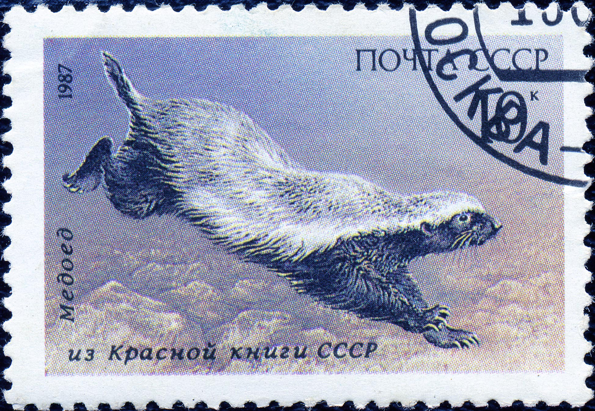 Почтовая марка СССР. 1987. Медоед из Красной книги СССР